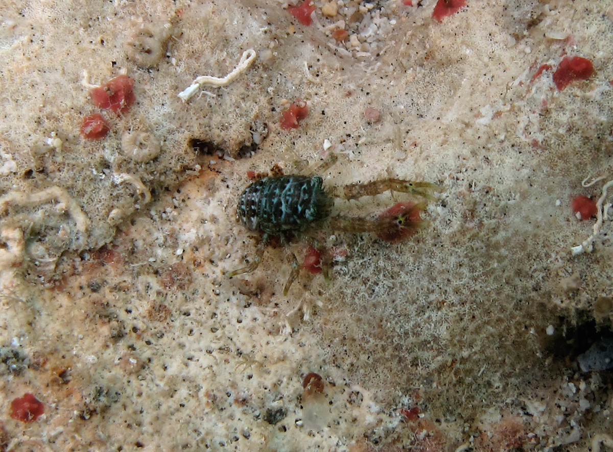 Galathea mauritiana (1 cm) à la Réunion.